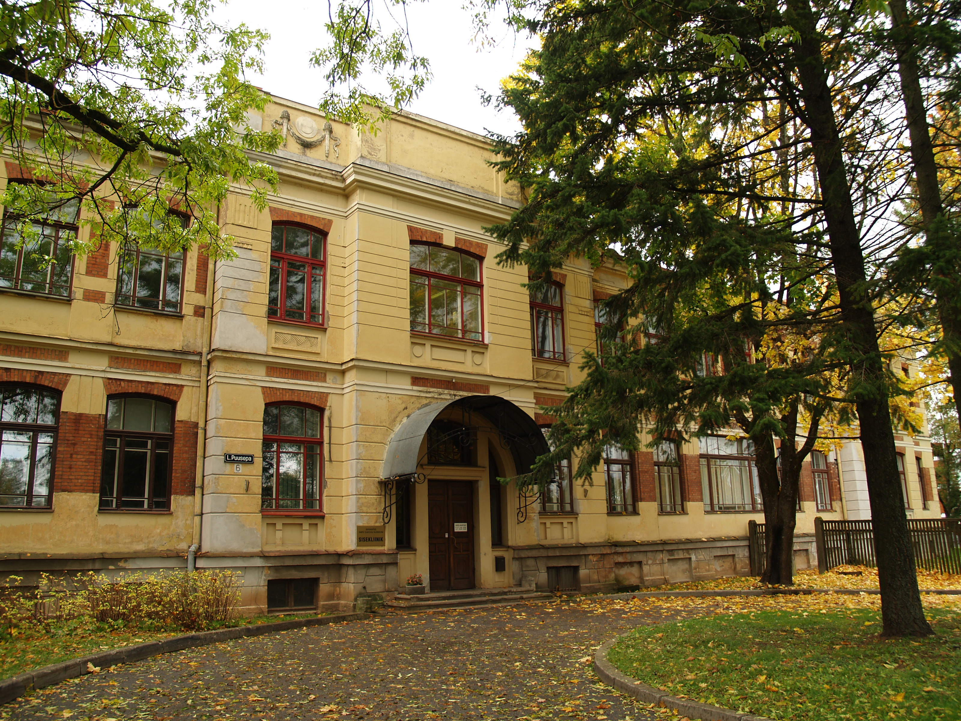 Tartu Maarjamõisa kliiniku hoone Puusepa 6, 1914-1915.a.